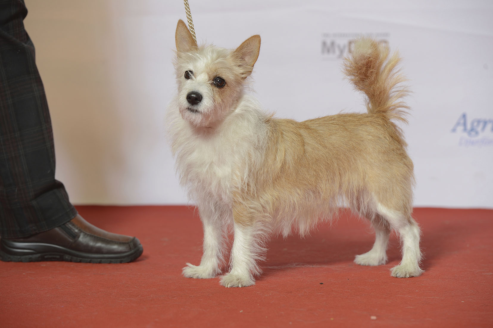 BIR Grupp 5 PODENGO PORTOGUES, CERDOSO/PEQUENO CH VDH CH Cachopa Do Vale Do Juiz MyDOG, Nordens största hundevenemang